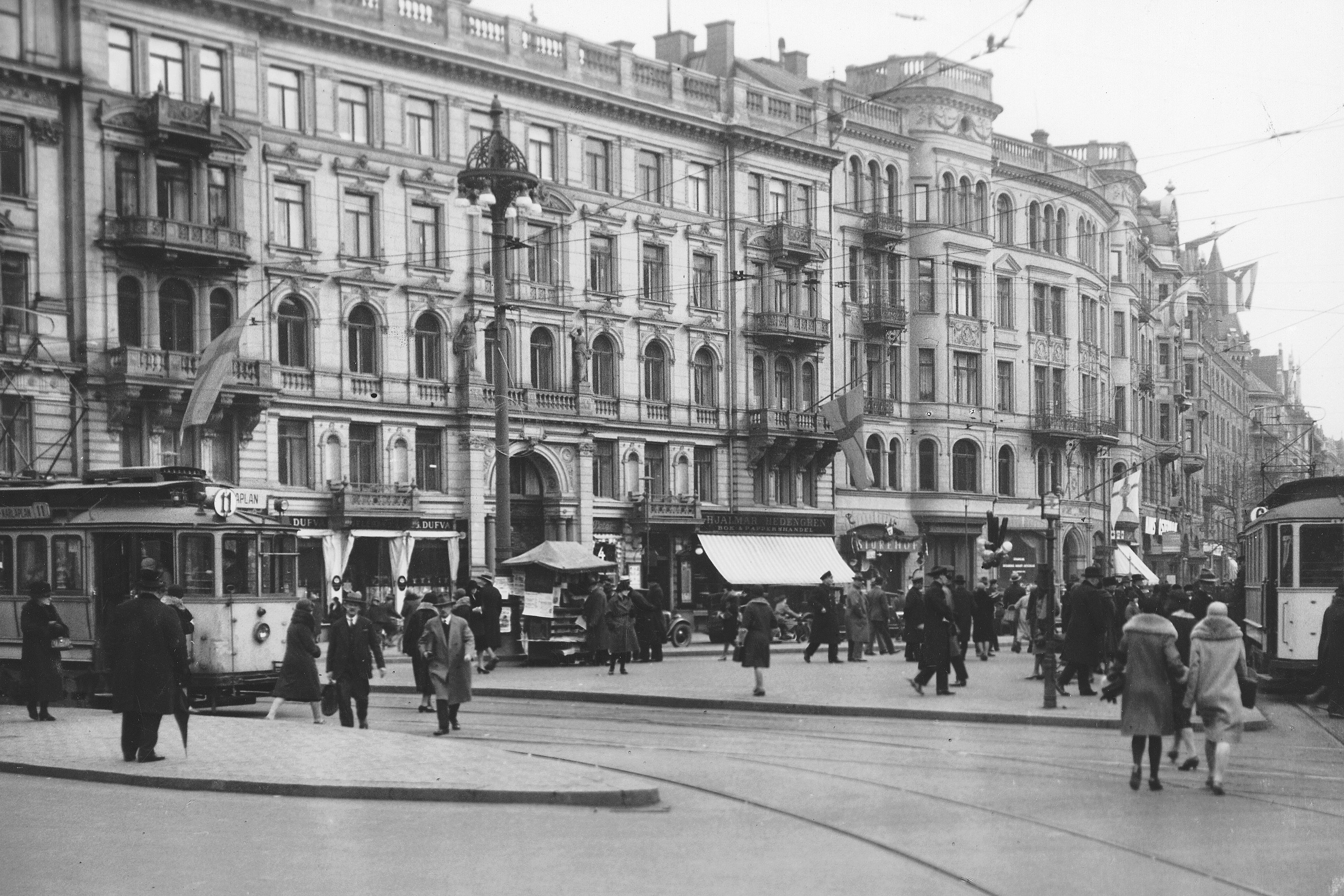 Stureplan och fasad mot kvarteret Sperlingens backe (dagens Sturegallerian)